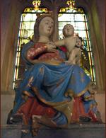 Saint-Hubert (Moselle) - Vierge à l'enfant en pierre à l'intérieur de la chapelle de Notre-Dame-De-Rabas - VIGY - vallée de la canner